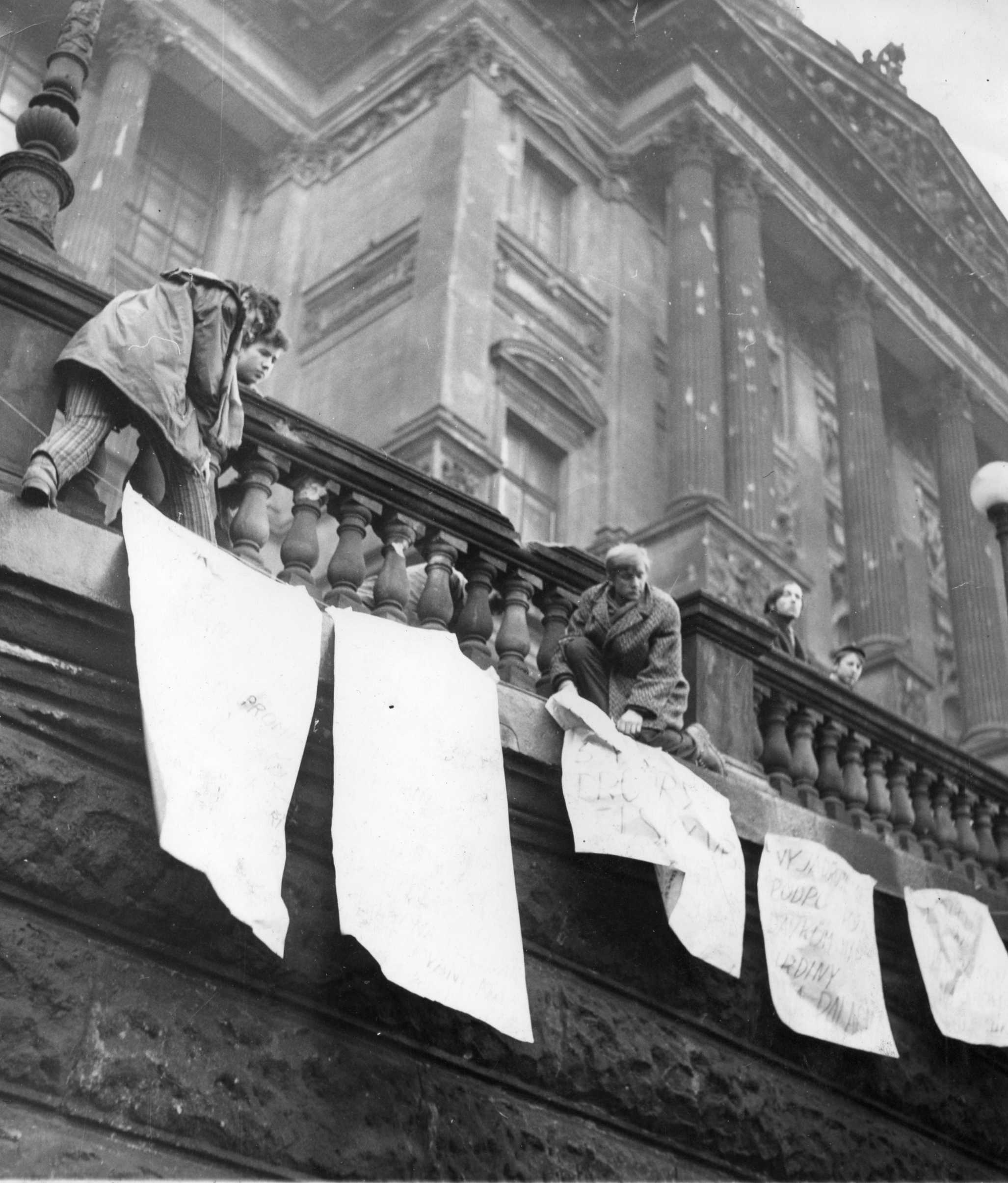 Demonstranti věší plakáty před budovu Národního muzea, které má stále ještě poškozenou fasádu z invaze v roce 1968. Demonstrace proti okupaci, srpen 1969.